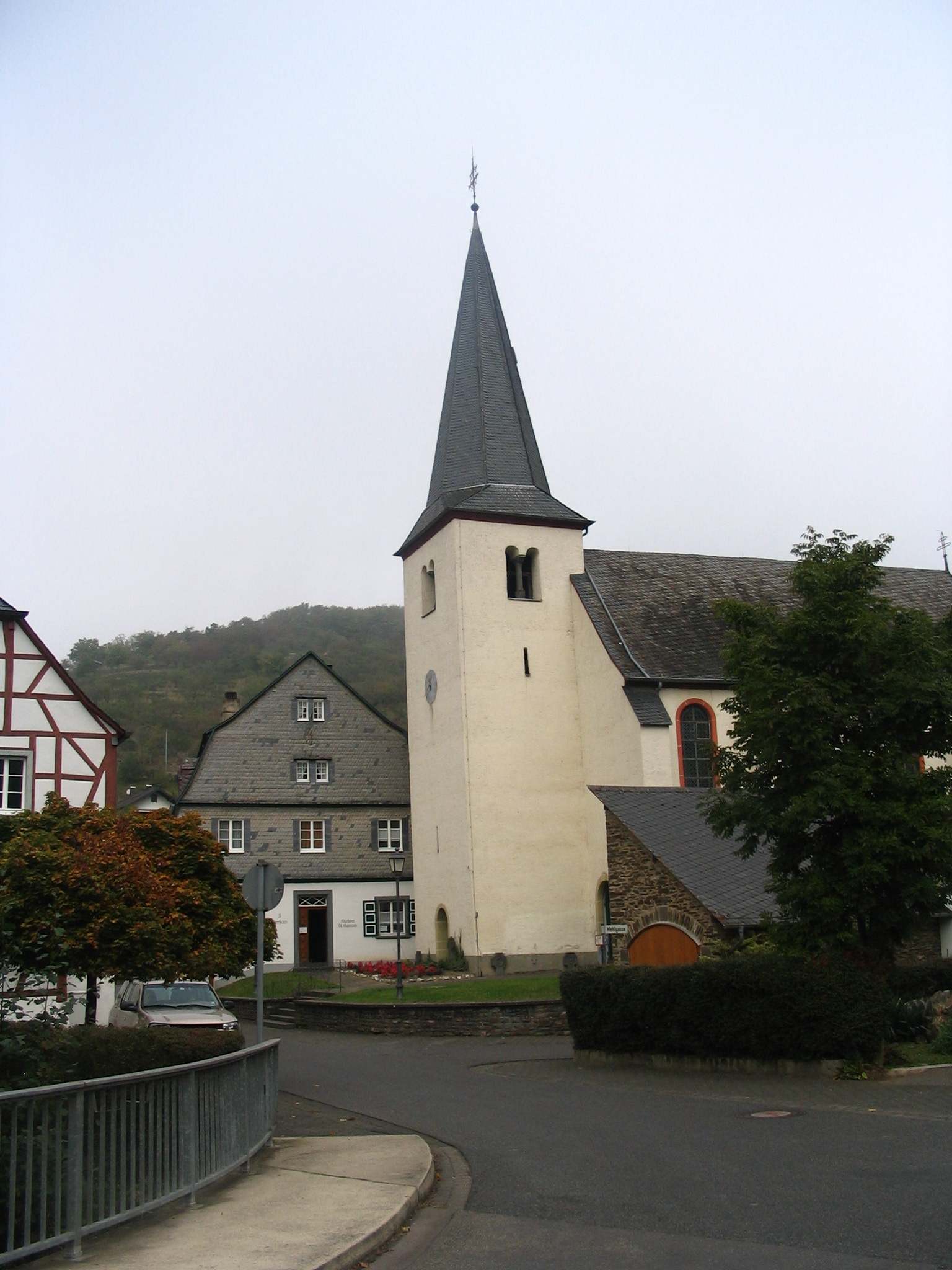 Kirche im Dorfzentrum